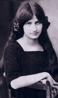 Jeanne Hébuterne (1898-1920) French artist